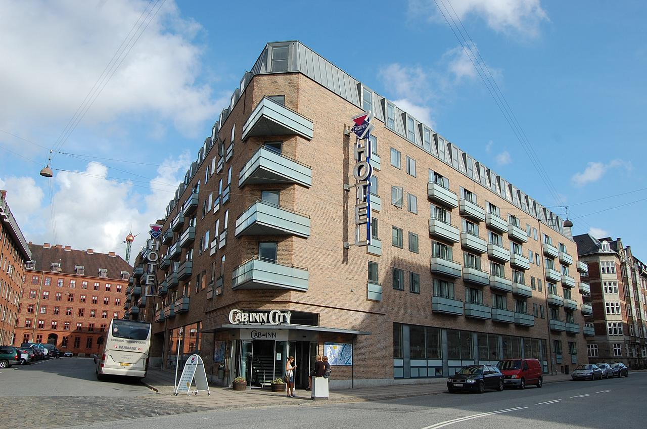 Hotel CABINN City in Copenhagen, Denmark